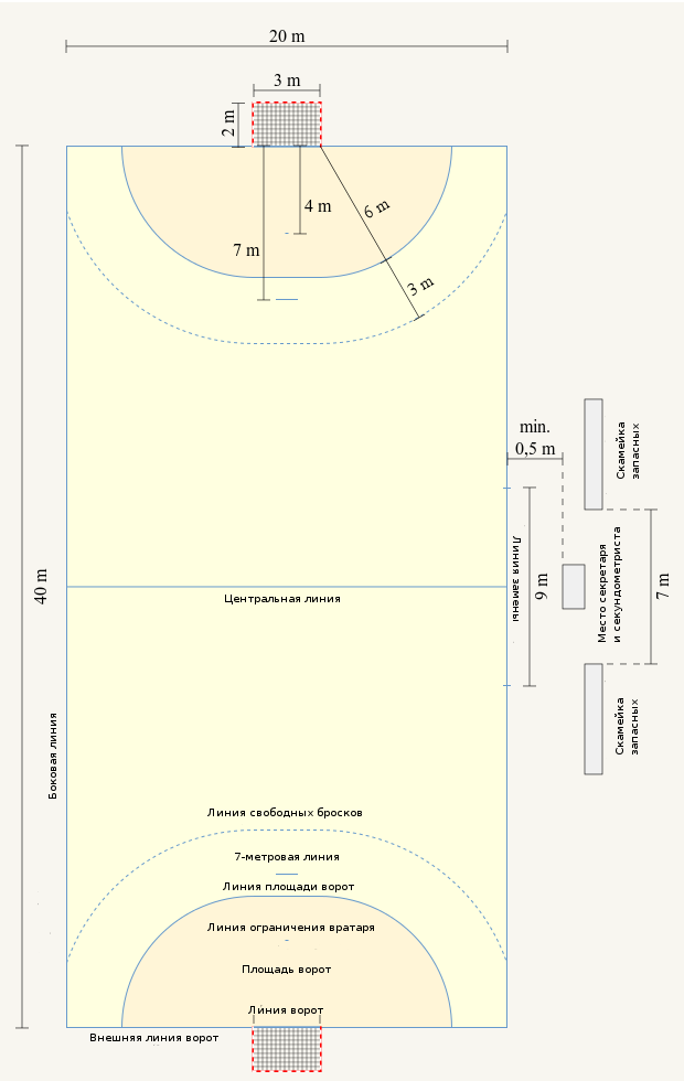 Площадка для гандбола